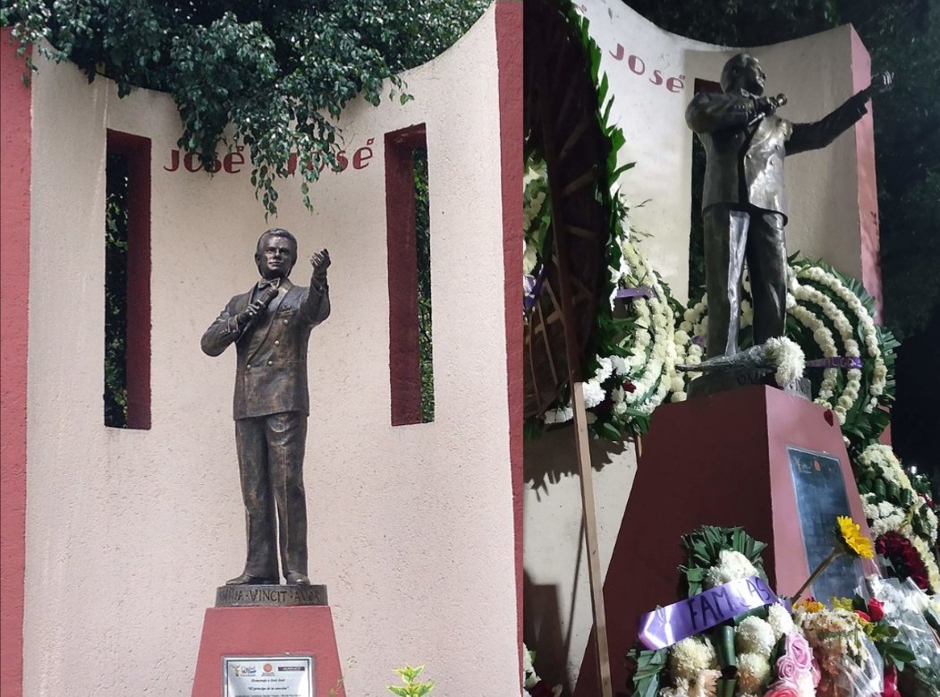 Collage de fotos que incluyen de un lado la estatua de José José (sin flores) y del otro lado la estatua adornada con arreglos florales tras su fallecimiento en 2019.